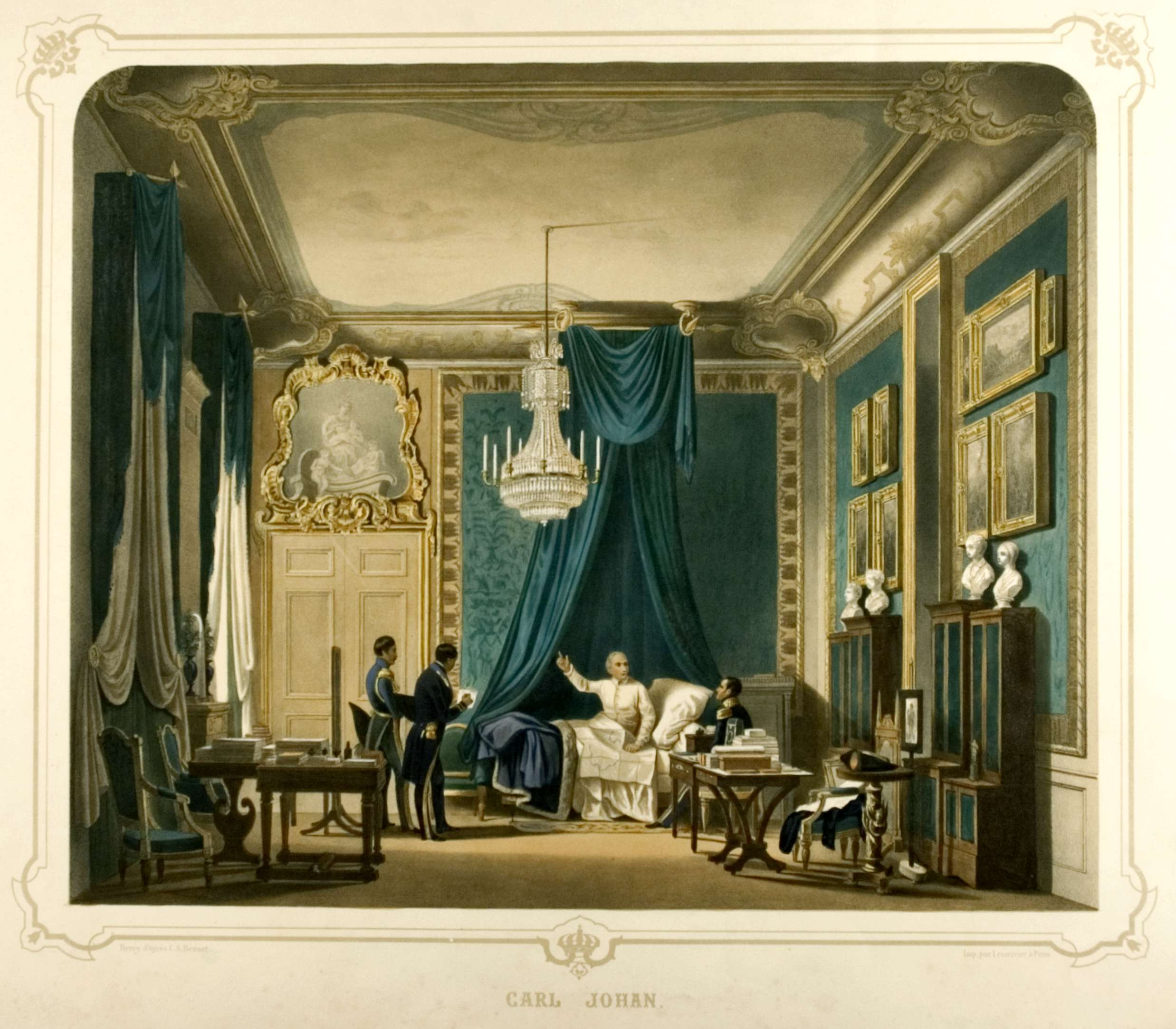 Karl Johan konfererer med embetsmenn fra sengen i sitt sove-og arbeidsværelse på Stockholm slott - Norsk Folkemuseum - Påskrift: CARL JOHAN. Påskrift: Deroy d'apries C. S. Bennet / Imp. par Lemercier, à Par. Aksesjon:1915 (Deponert til Norsk Folkemuseum). Deponert fra: Bernadottemuseet. Inngår i utstillingen "1814 – Spillet om Danmark og Norge" ved Norsk Folkemuseum 14. jan 2014 — 31. jul 2014.